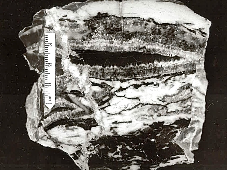 Devonischer Mikrit (Elbingeröder Komplex, Höhlenrestaurant in Rübeland), Anschliff